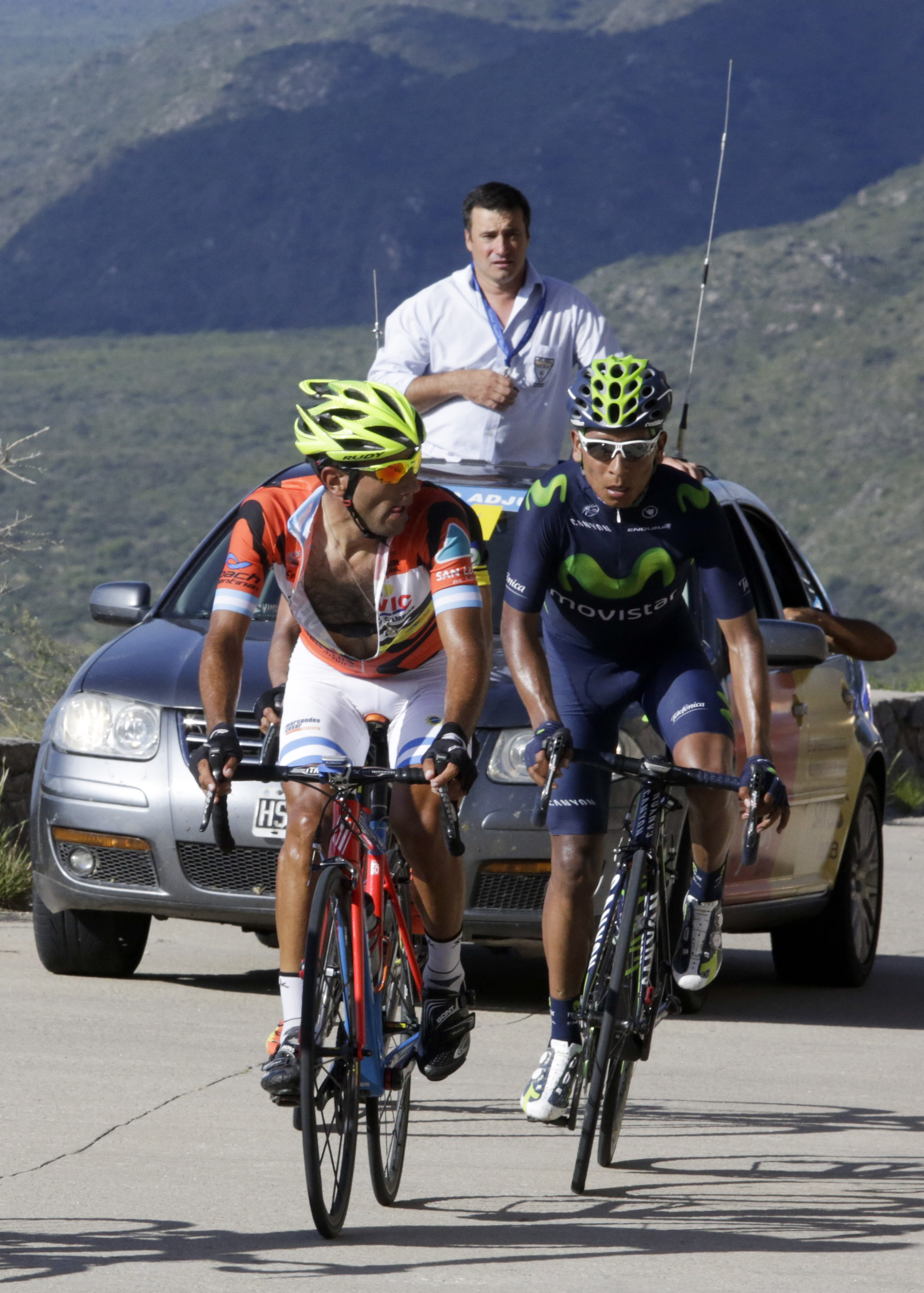 Nairo Quintana, del Equipo Movistar, y Daniel Diaz, de Funvic Brasilinvest, trepan la cuesta del Cerro El Amago al final de la cuarta etapa del Tour de San Luis, Argentina, que partió de Villa Dolores, 22 de enero de 2015. Diaz ganó la etapa y Quintana llegó 4to.